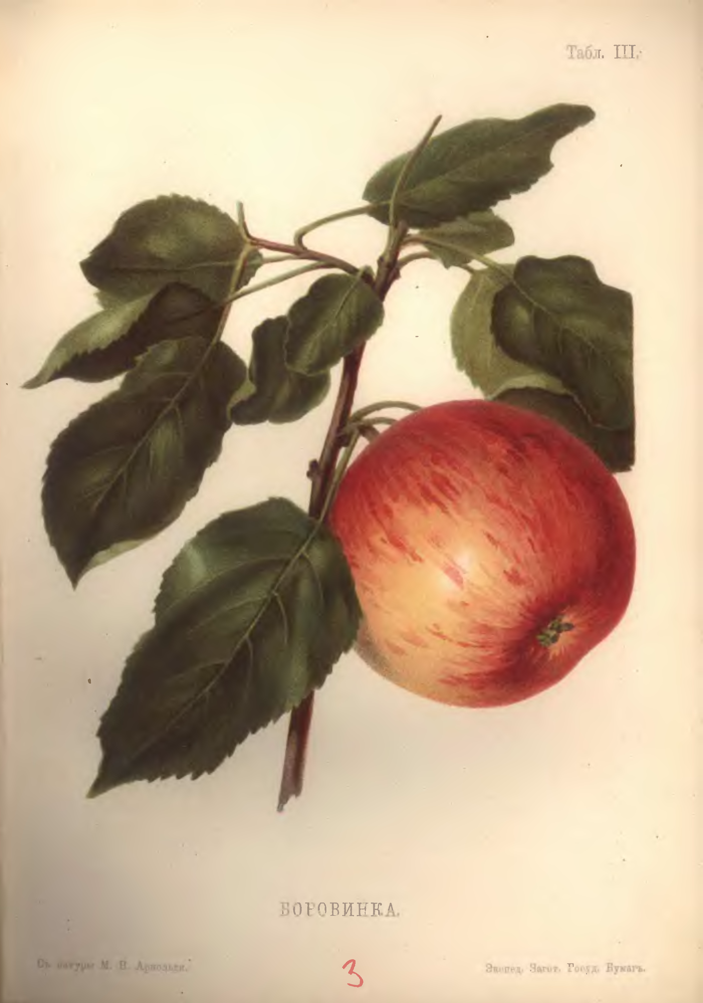 Боровинка